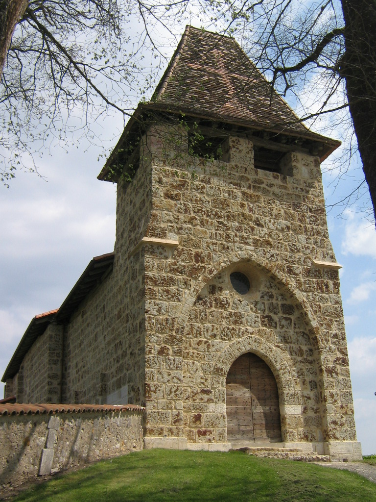 Eglise de Saint André de Double (forêt de la Double, Dordogne).